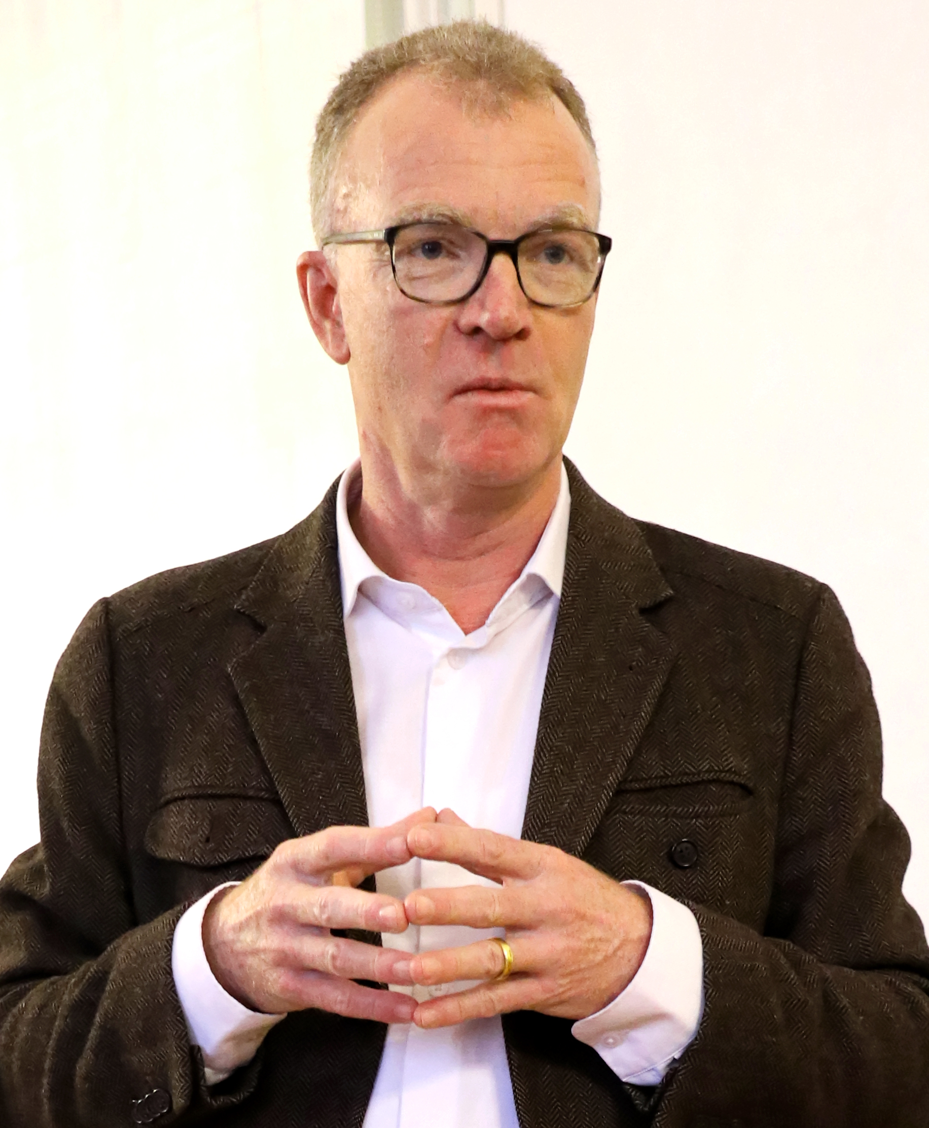 aufgenommen im Rahmen des WikiAlpenforumstreffens am 3.11.2018. Johannes Honsig-Erlenburg ist seit 2006 Präsident der Internationalen Stiftung Mozarteum Salzburg